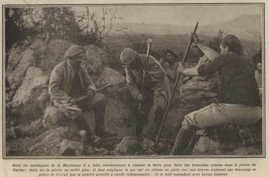 les troupes française au travail pour creuser des tranchées dans les montagnes de Macédoine.